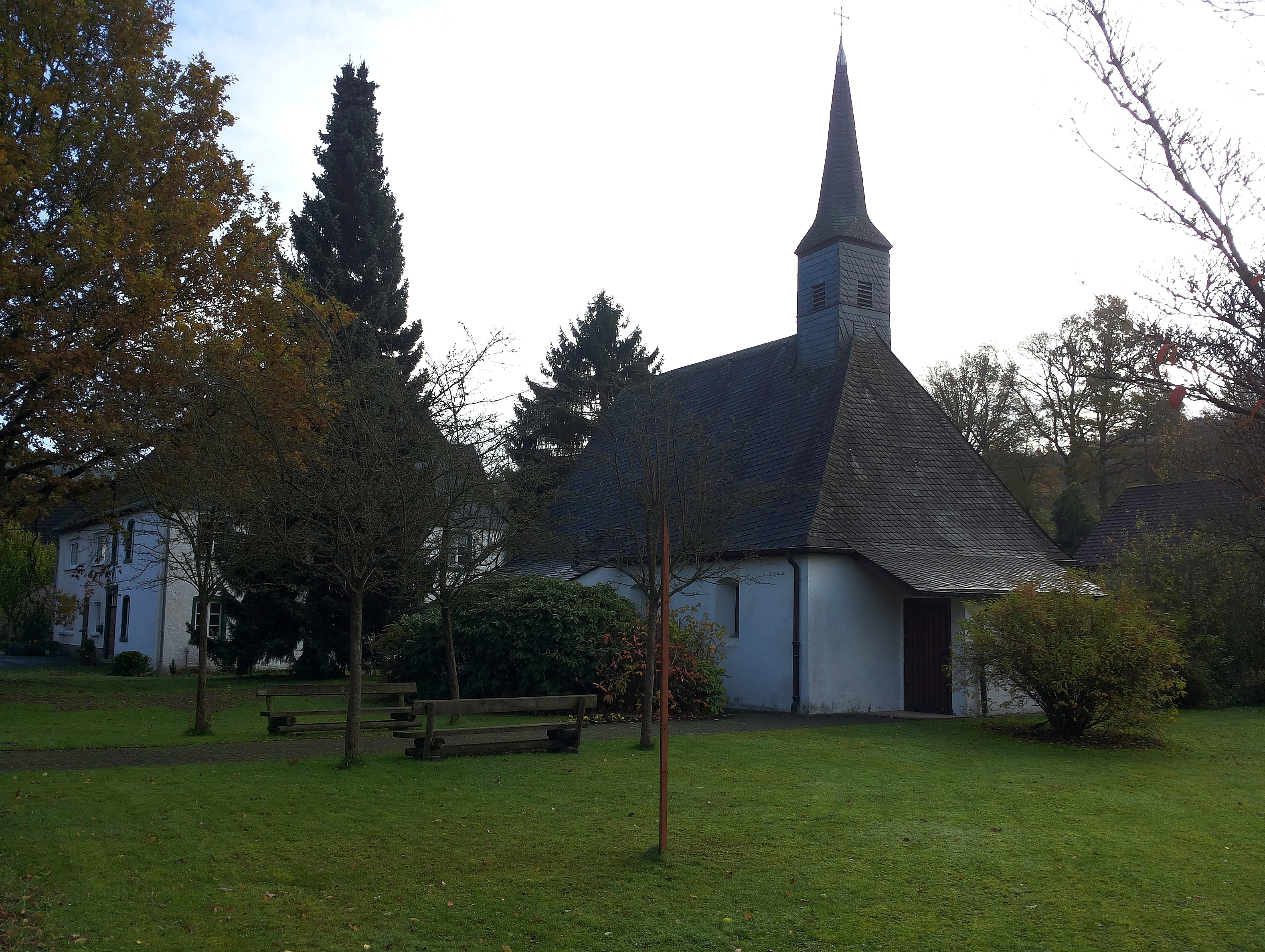 Jakobus Kapelle in Sundern-Recklinghausen(Germany)